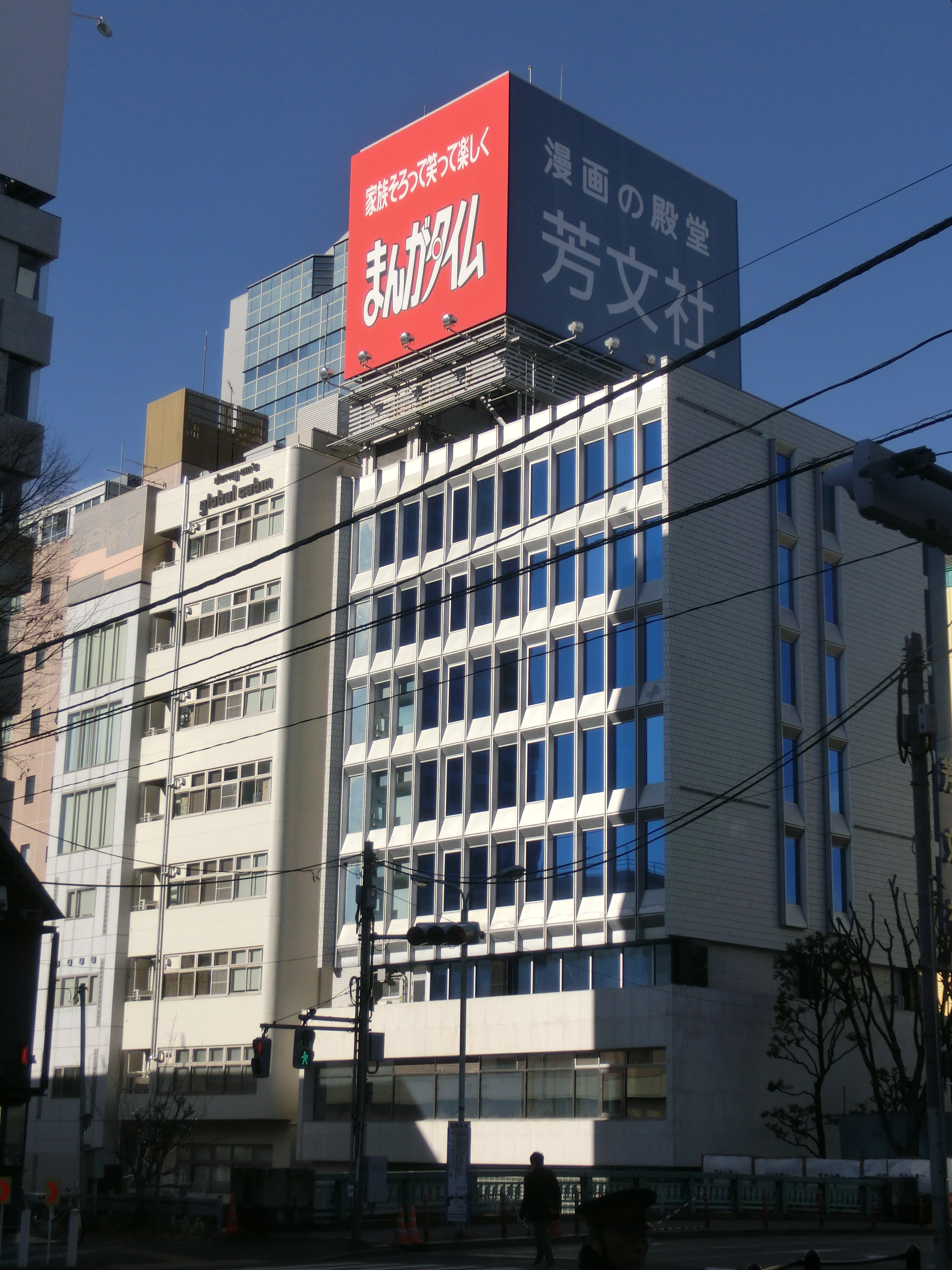 芳文社本社。